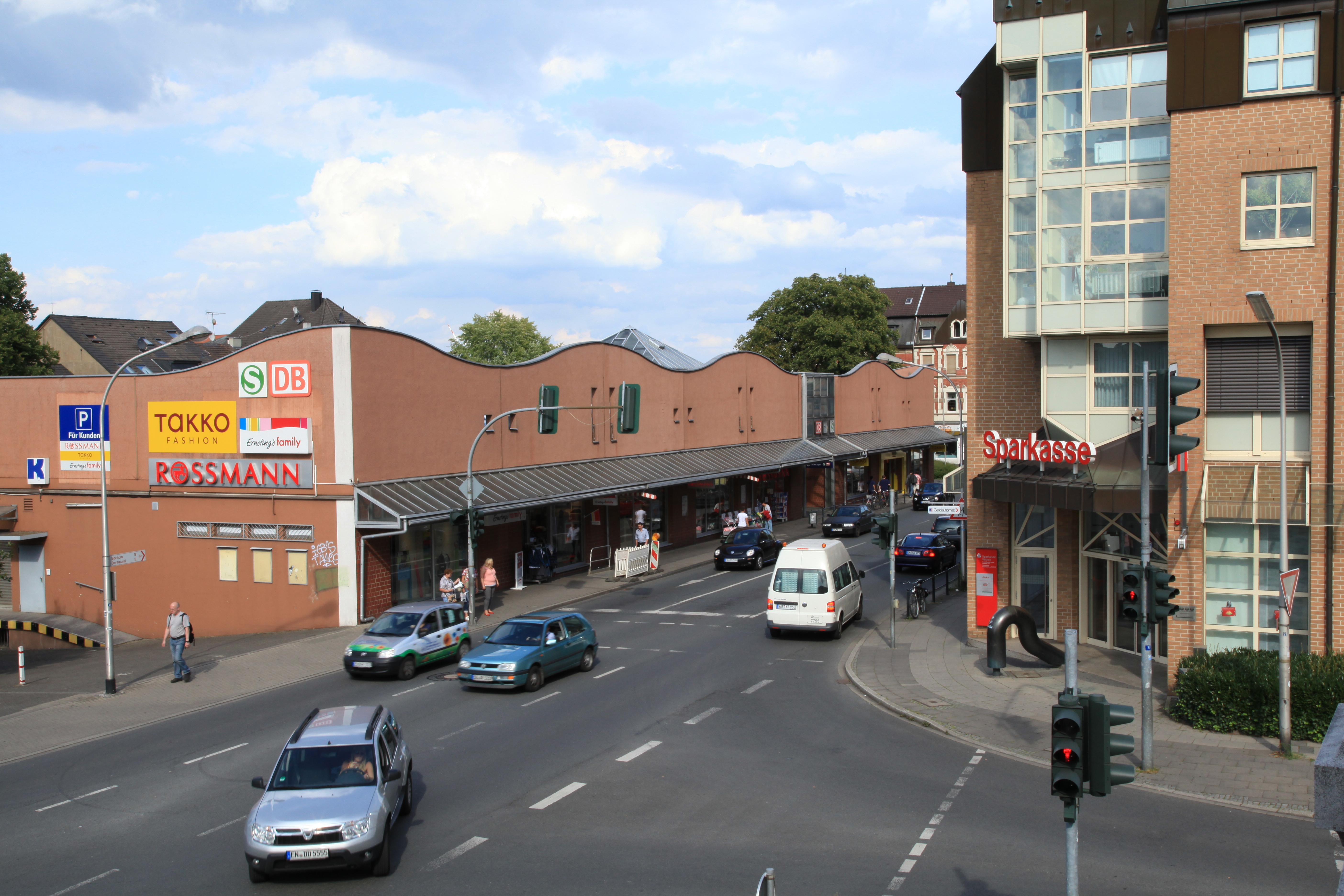 Annenstraße (links) und Herdecker Straße (rechts) in Witten-Annen